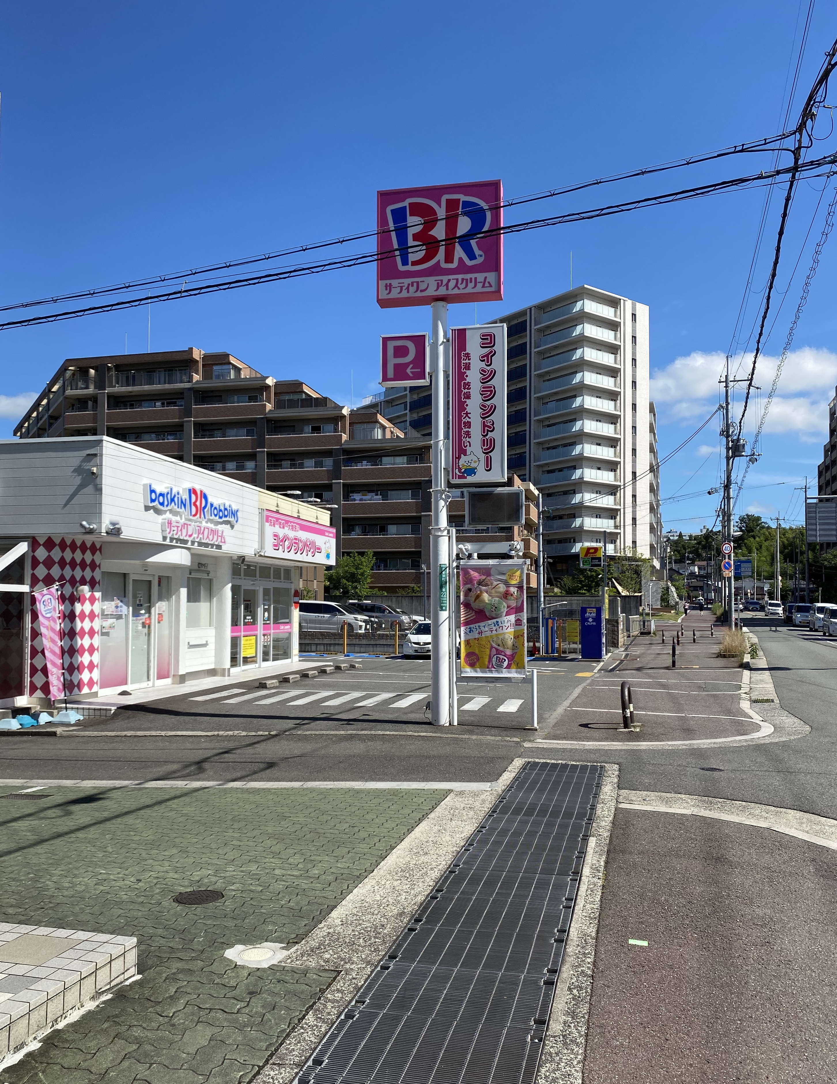 大阪府高槻市古曽部町2丁目にて。初夏。 サーティーワンアイスクリームが見える。